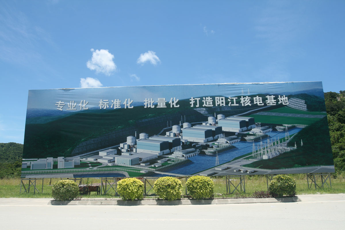 Bautafel des Kernkraftwerks Yangjiang, China